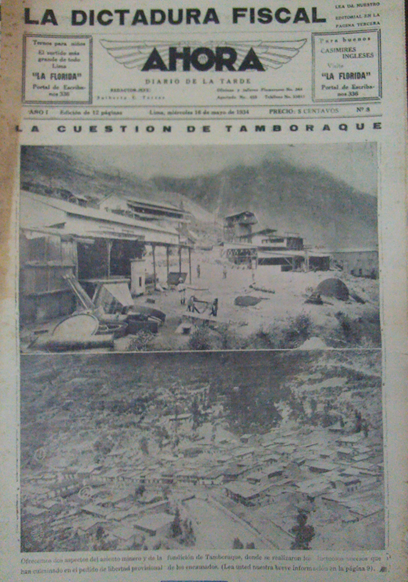 Foto de la portada del Diario Ahora Lima Perú Nº8